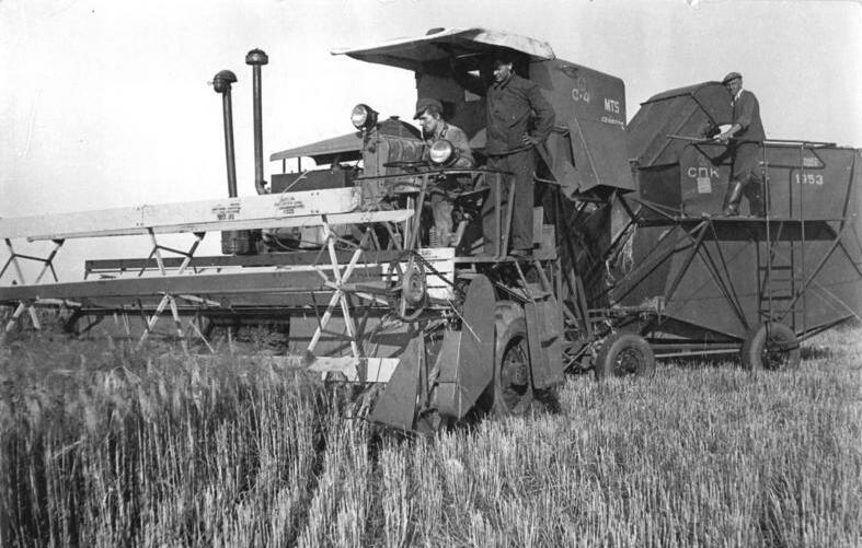 Schwoitsch, Getreideernte mit Mähdrescher, Gerste Zentralbild Gerbeth 3.7.1953 Ernte in der Deutschen Demokratischen Republik Im Saalkreis des Bezirks Halle ist die Ernte im vollen Gange. Eine große Hilfe und Erleichterung bringen die sowjetischen Erntemaschinen, die auch auf den Feldern des Saalkreises eingestzt sind. UBz: Kollegen der MTS Gröbers ernten mit dem "Stalinez 4" die Wintergerste auf den Feldern der Genossenschaft in Schwoitsch. Am Steuer der zweifache Aktivist Liebtal. Leihweise Zentral Bild x